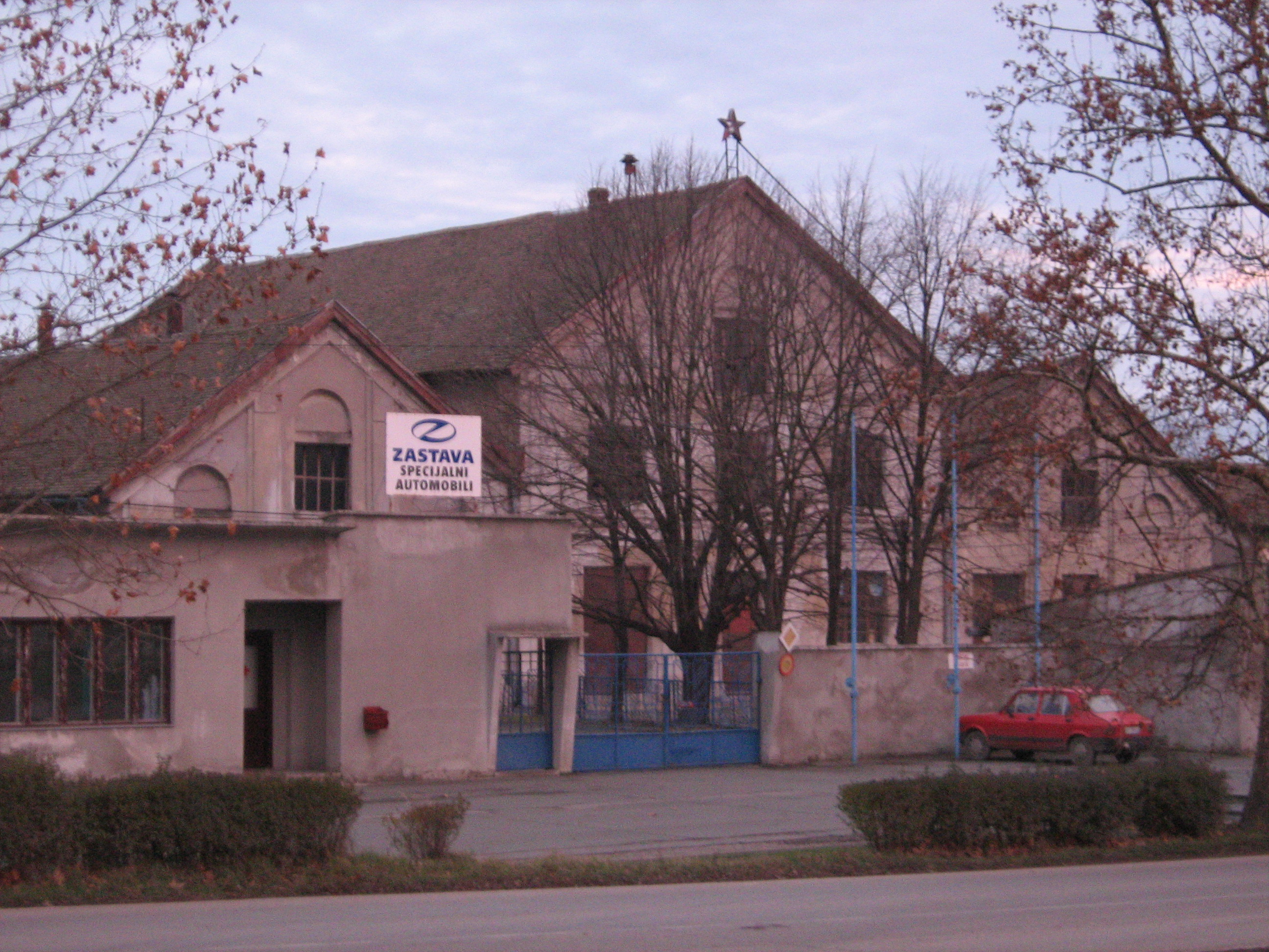 Zastava specijalna vozila Sombor